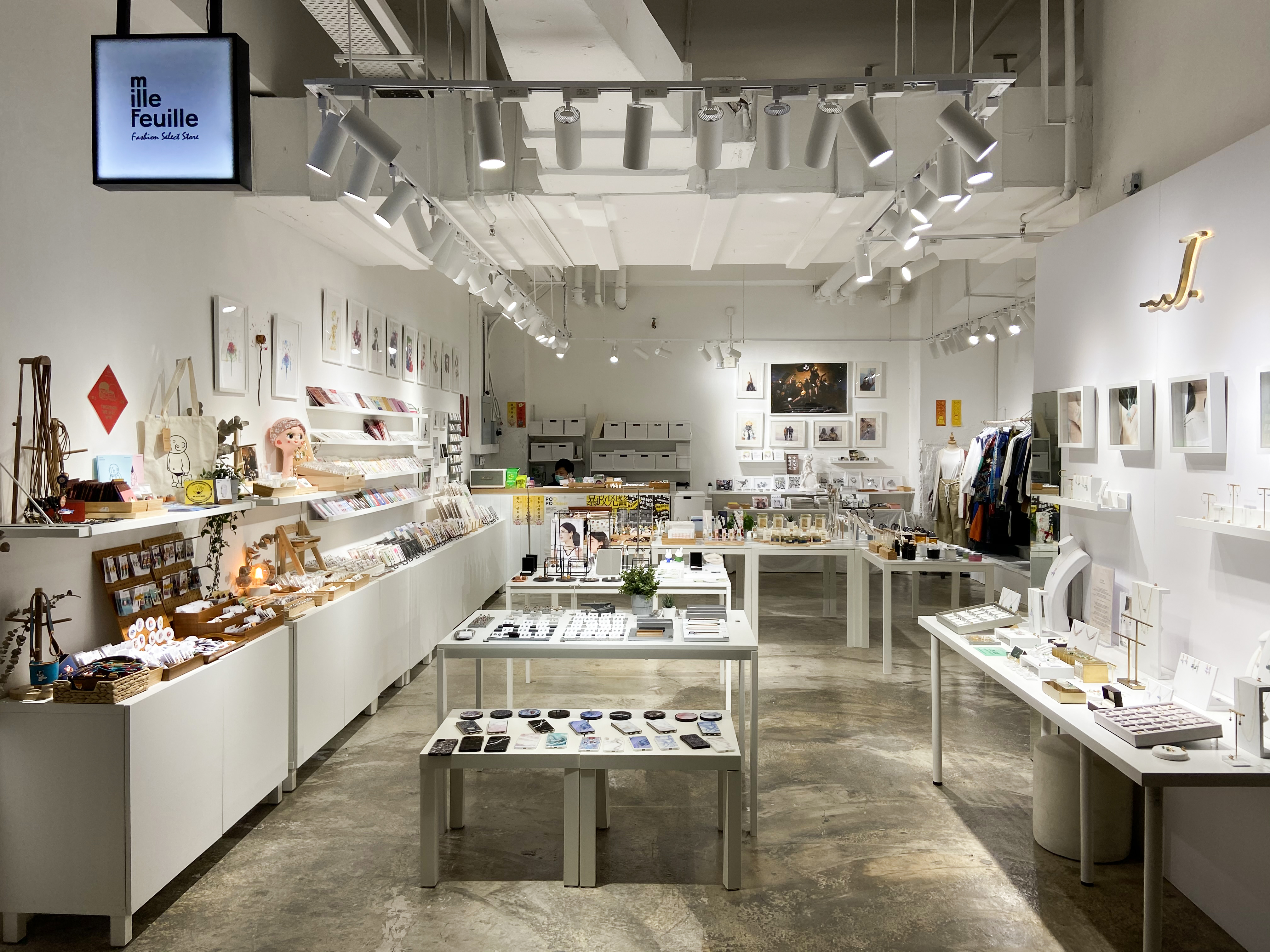 m illle Feuille